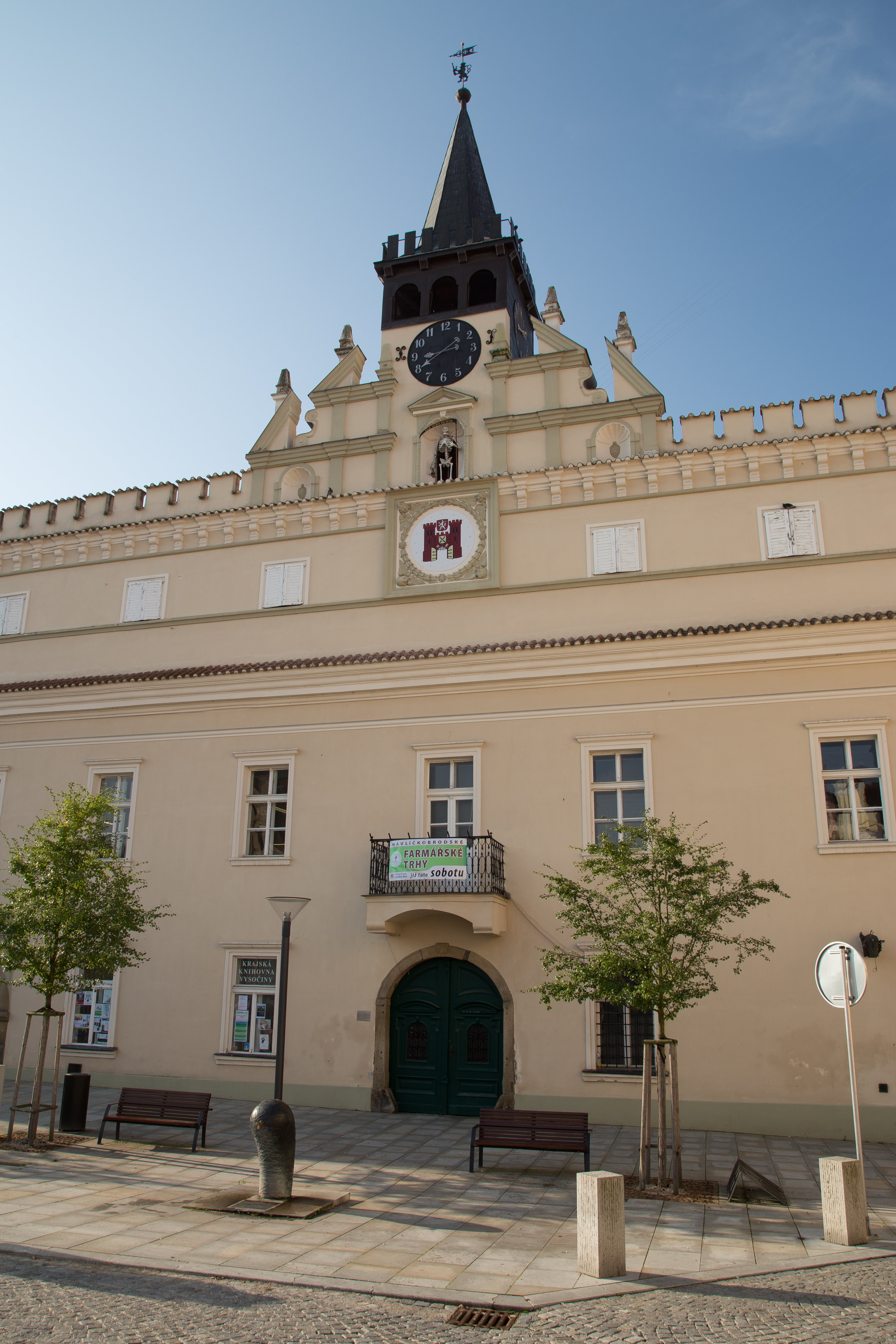 Regional Library